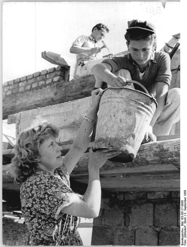 Bau eines Rinderoffenstalls Zentralbild Zühlsdorf 3.9.1958 Vom Bauplatz der Jugend in der Wische. Auf dem Bauplatz der Jugend in der altmärkischen Wische sind insgesamt 165 km Gräben instandgesetzt worden. Bis zum 30. September 1958, dem letzten Tag des diesjährigen Wischeeinsatzes, sollen 175 km Wasserläufe in Ordnung gebracht sein. Seit dem 15. Mai, dem Beginn der großen Aktion in der altmärkischen Wische, sind von den jungen Sozialisten außer den Grabenaufräumungsarbeiten acht Rinderoffenställe, drei Silos und ein großer Düngerschuppen gebaut, sowie 14, 2 km Straßen instandgesetzt worden. Neben einer Vielzahl von Einsätzen in der Landwirtschaft halfen die Jugendlichen nach Feierabend noch insgesamt 18000 Stunden beim Nationalen Aufbauwerk. UBz: Rosemarie Vahl (links) aus der Schuhfabrik Roter Stern in Burg bei Magdeburg, die für Küchenarbeiten innerhalb der Burger-Brigade eingesetzt war, meldete sich freiwillig als Hilfsarbeiterin bei den Maurerlehrlingen des Kreisbaubetriebes Burg, die einen Rinderoffenstall für die LPG Rosa Luxemburg baut.